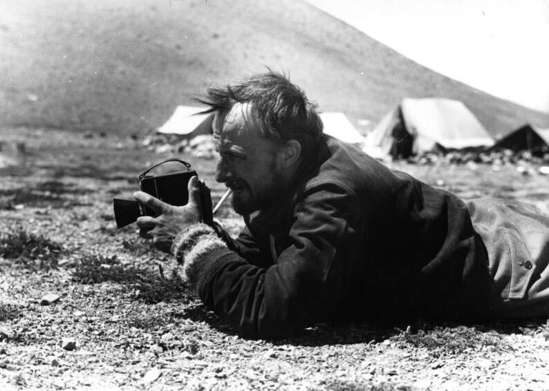 Gayamtsona [Gyamtsona] -See, Krause filmt, sehr deutlich die blauen Wicken